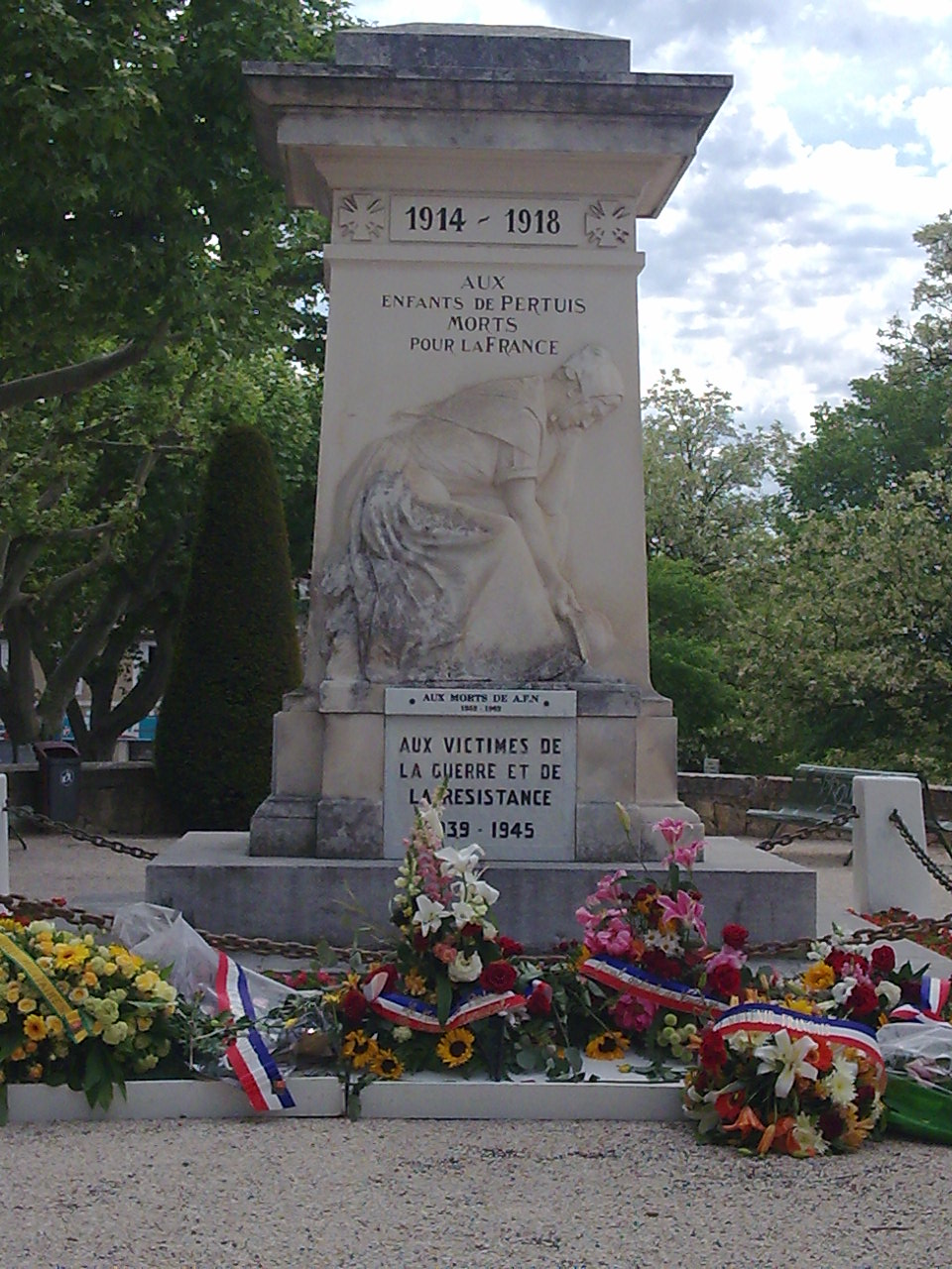 Monument aux Morts de Pertuis